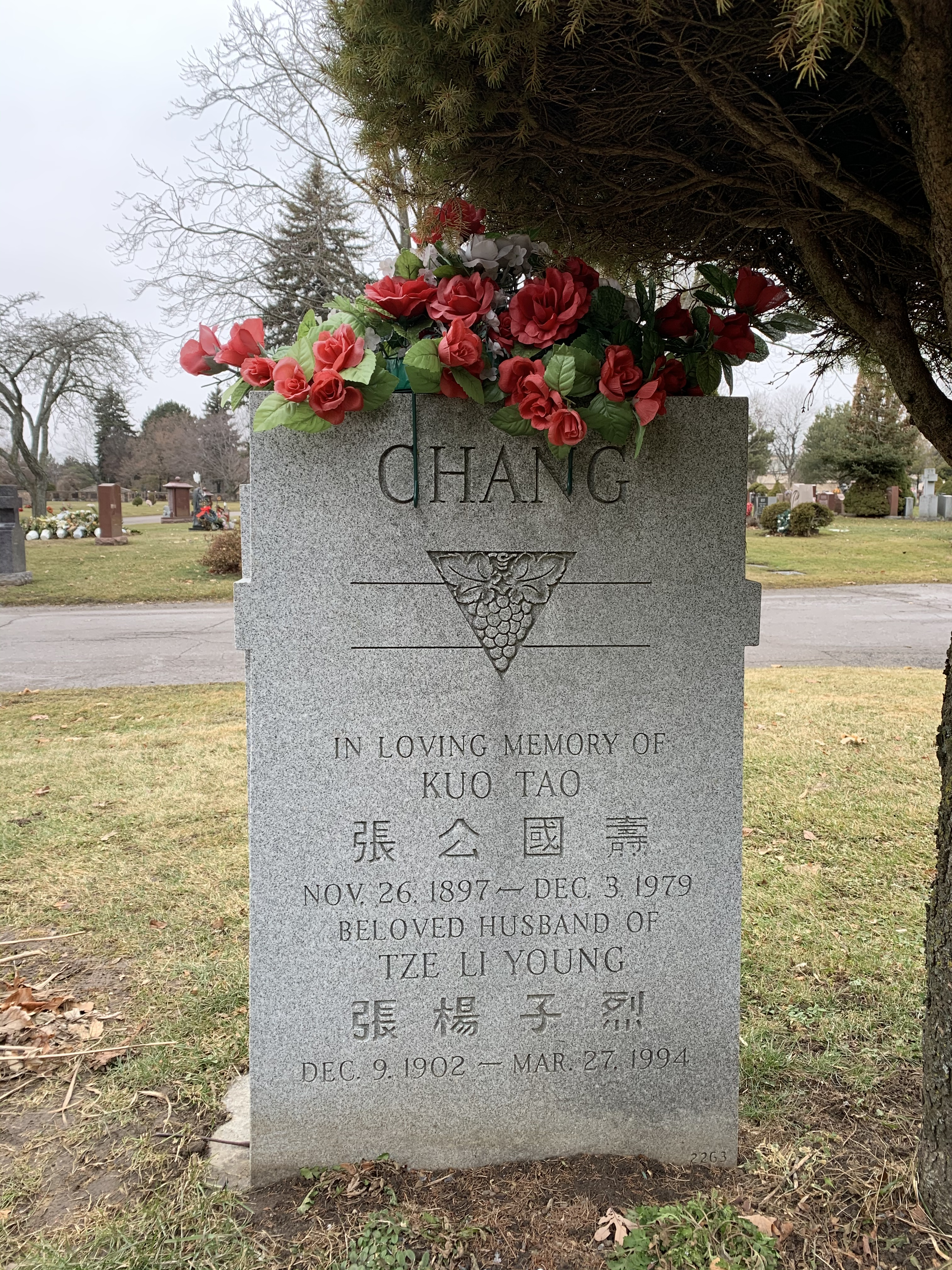 中文（中国大陆）: 多倫多張國燾墓碑